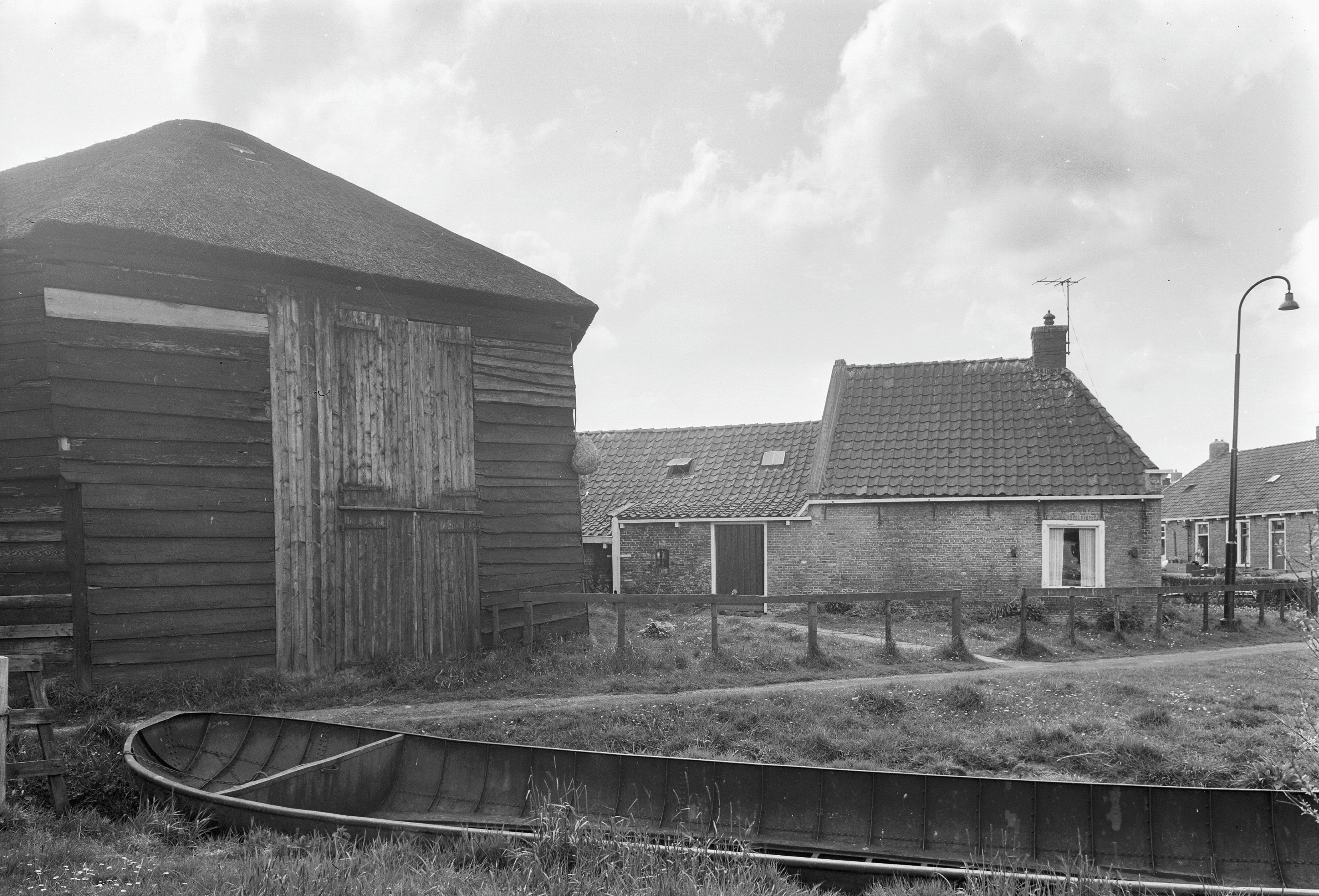 zijaanzicht